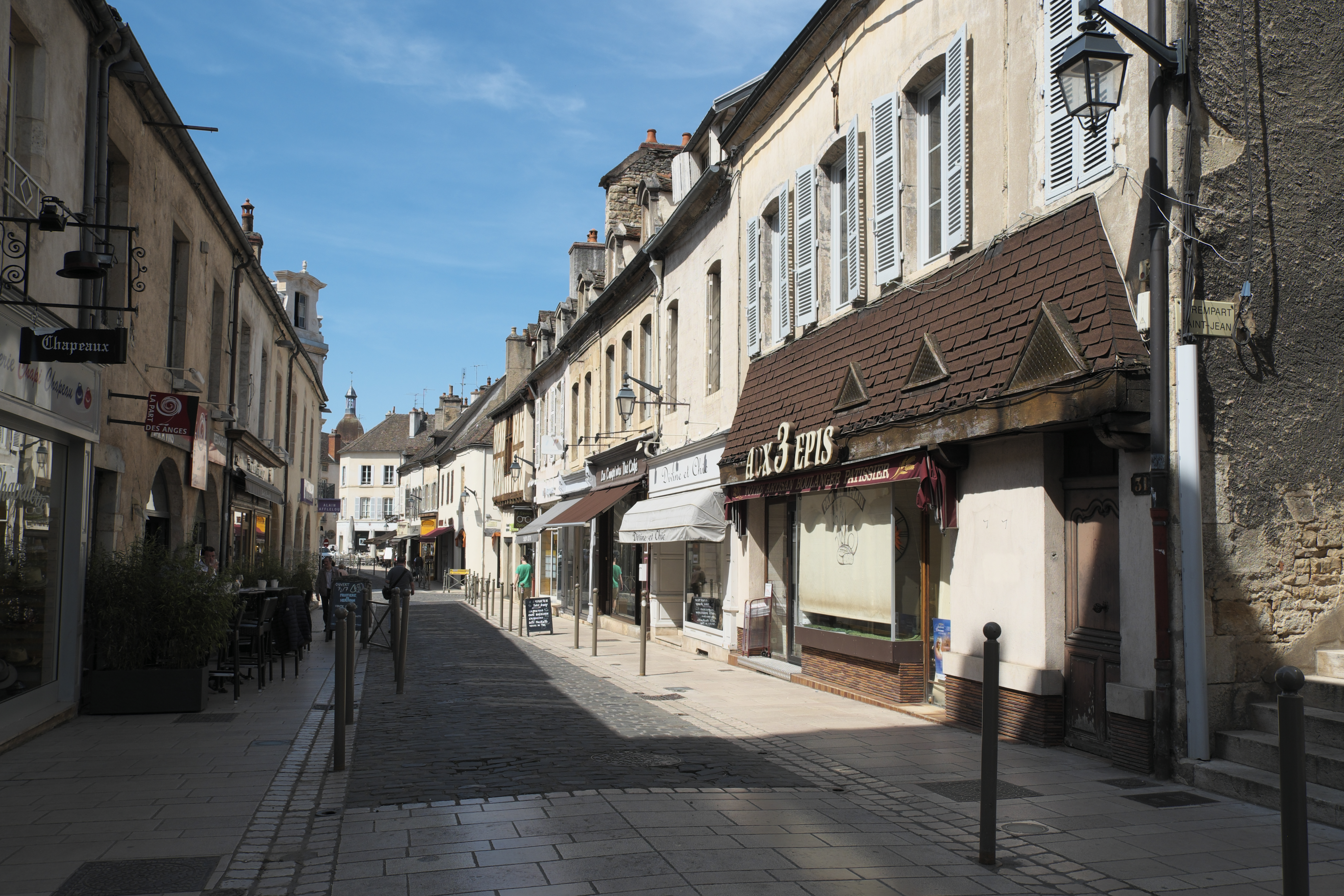 Straße in Beaune im Département Côte-d’Or (Bourgogne-Franche-Comté/Frankreich)